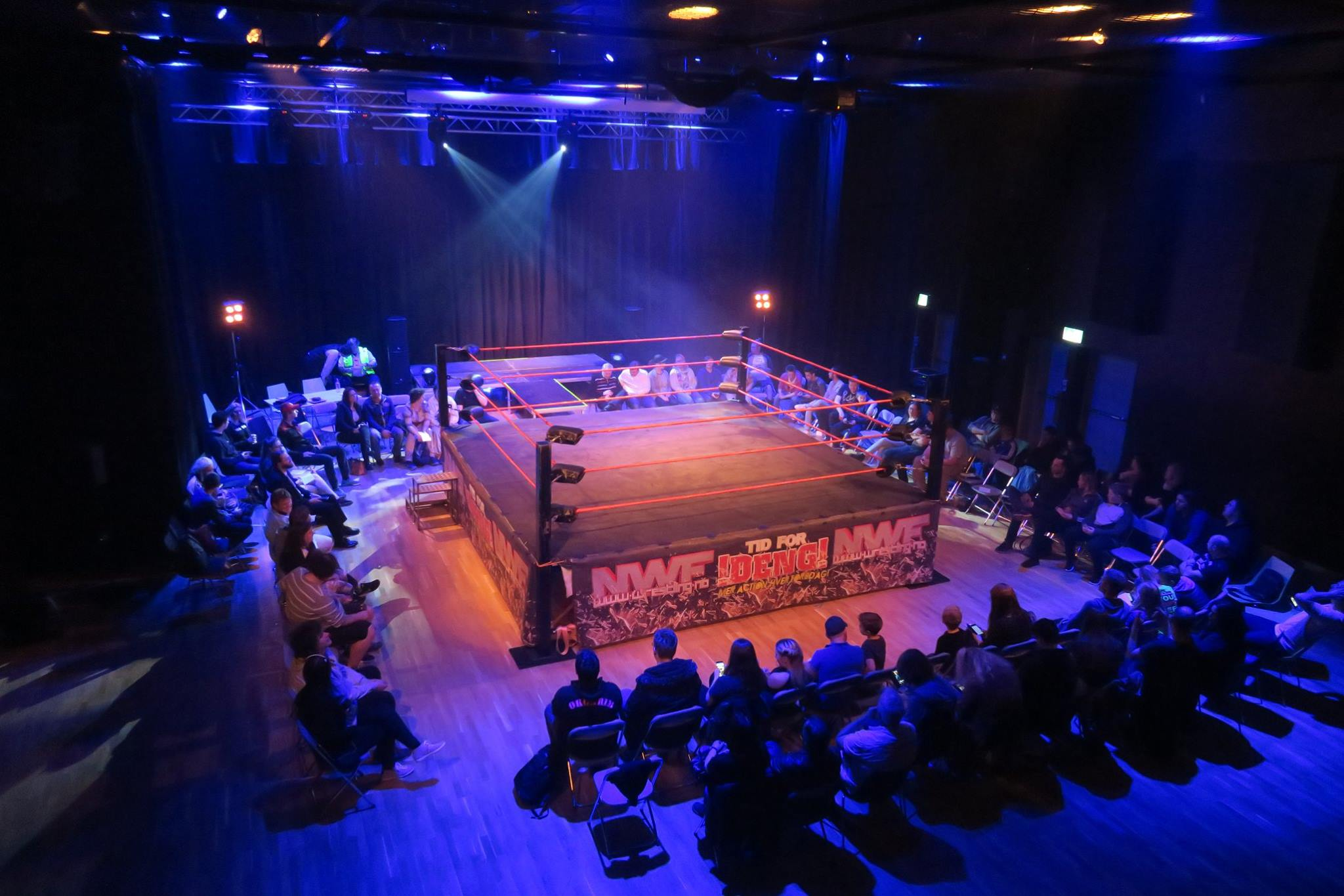 Norges Wrestlingforbunds ring